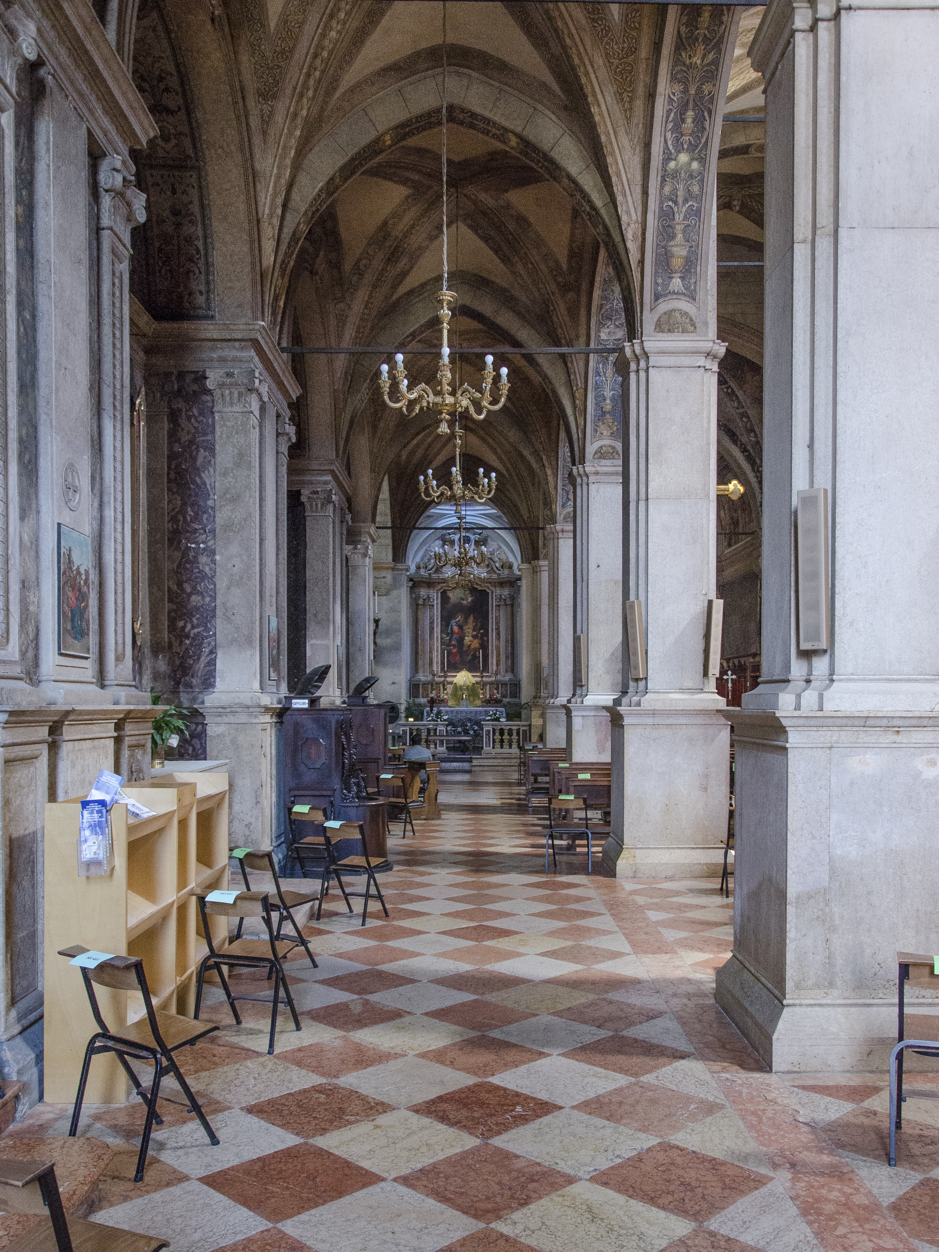 Chiesa dei Santi Nazaro e Celso a Verona. Interno, in stile rinascimentale.